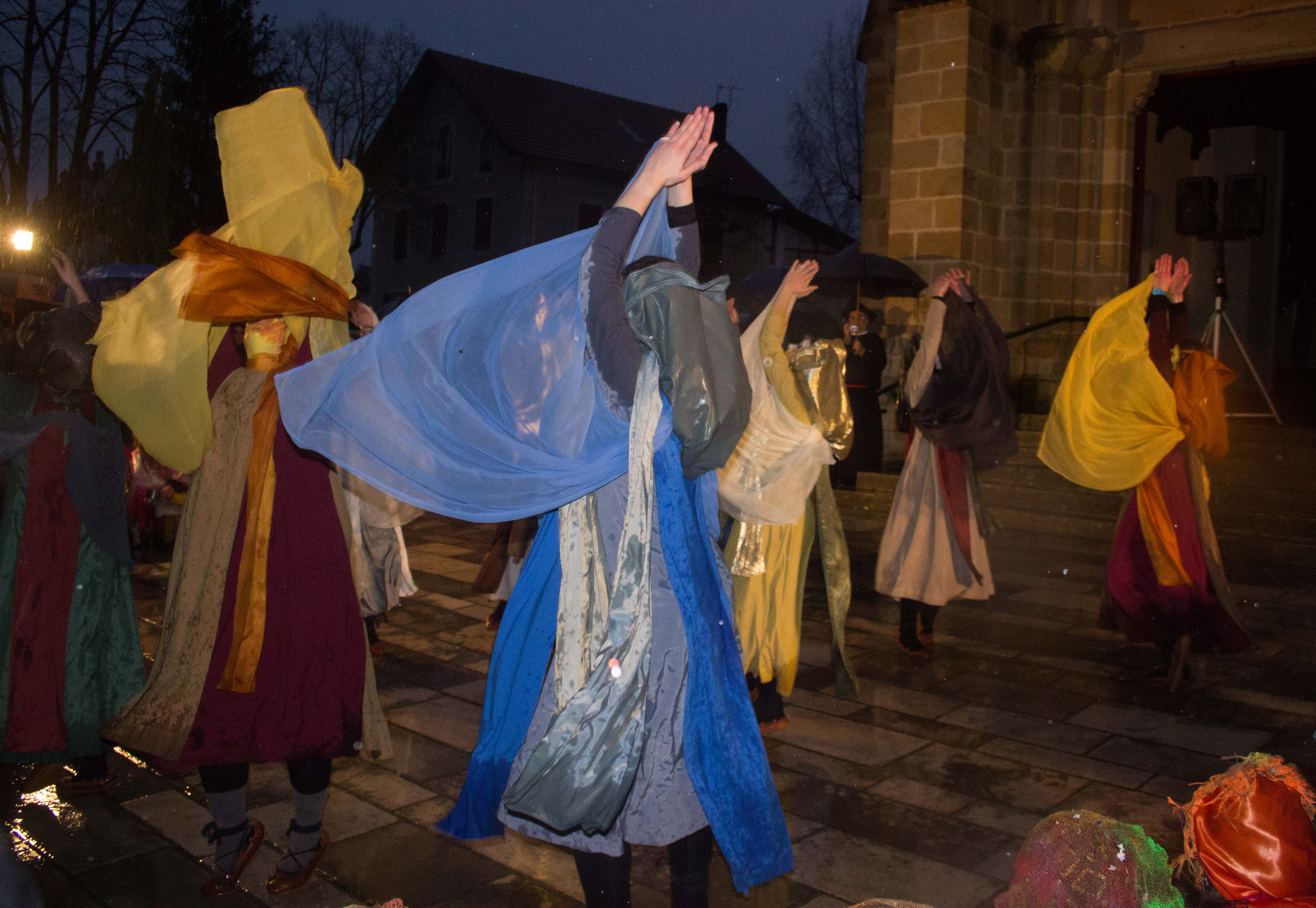 Uztaritzeko inauteriak 2014. Carnaval Ustaritz. Uztaritzeko inauteria 2014. Carnaval Ustaritz 2014